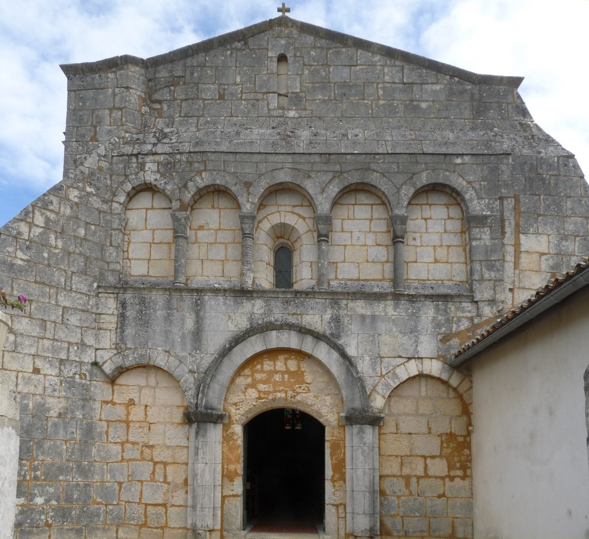 Façade de l'église de Semillac, Charente-Maritime, France